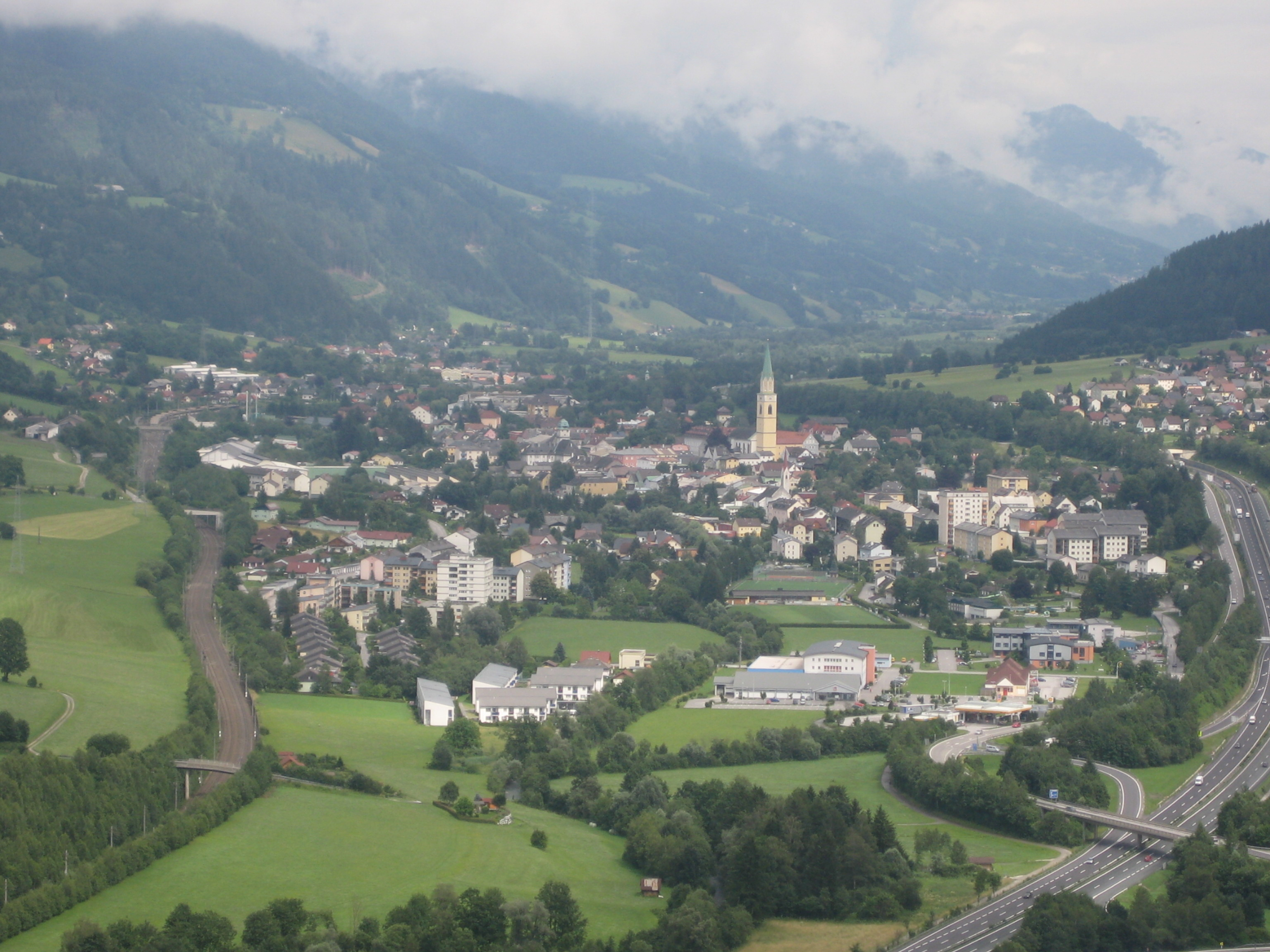 Foto der Stadt Rottenmann von der Burg Strechau